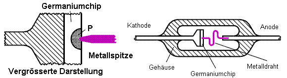 Schematische Darstellung einer Spitzendiode